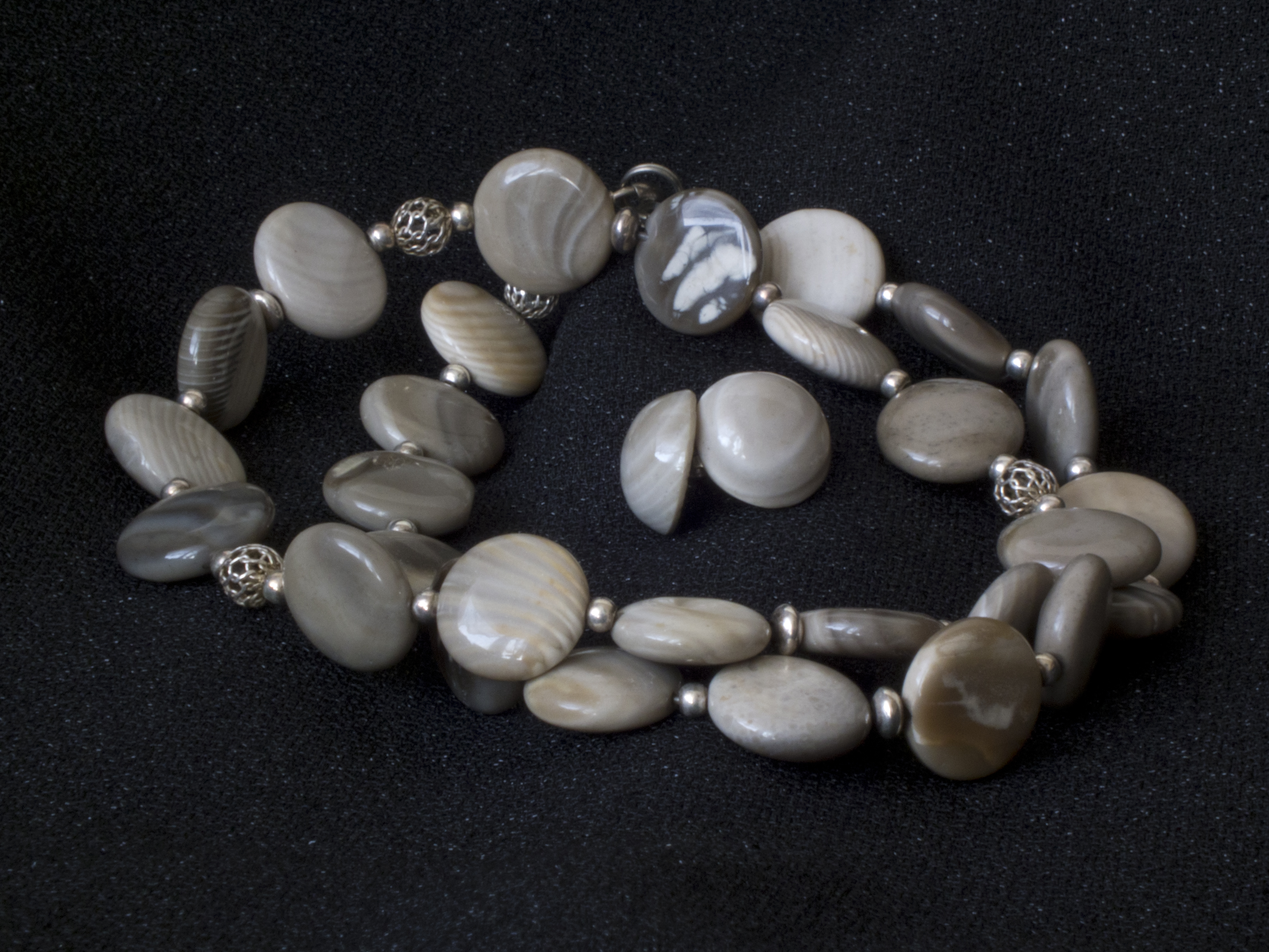 Korale z krzemienia pasiastego i srebra